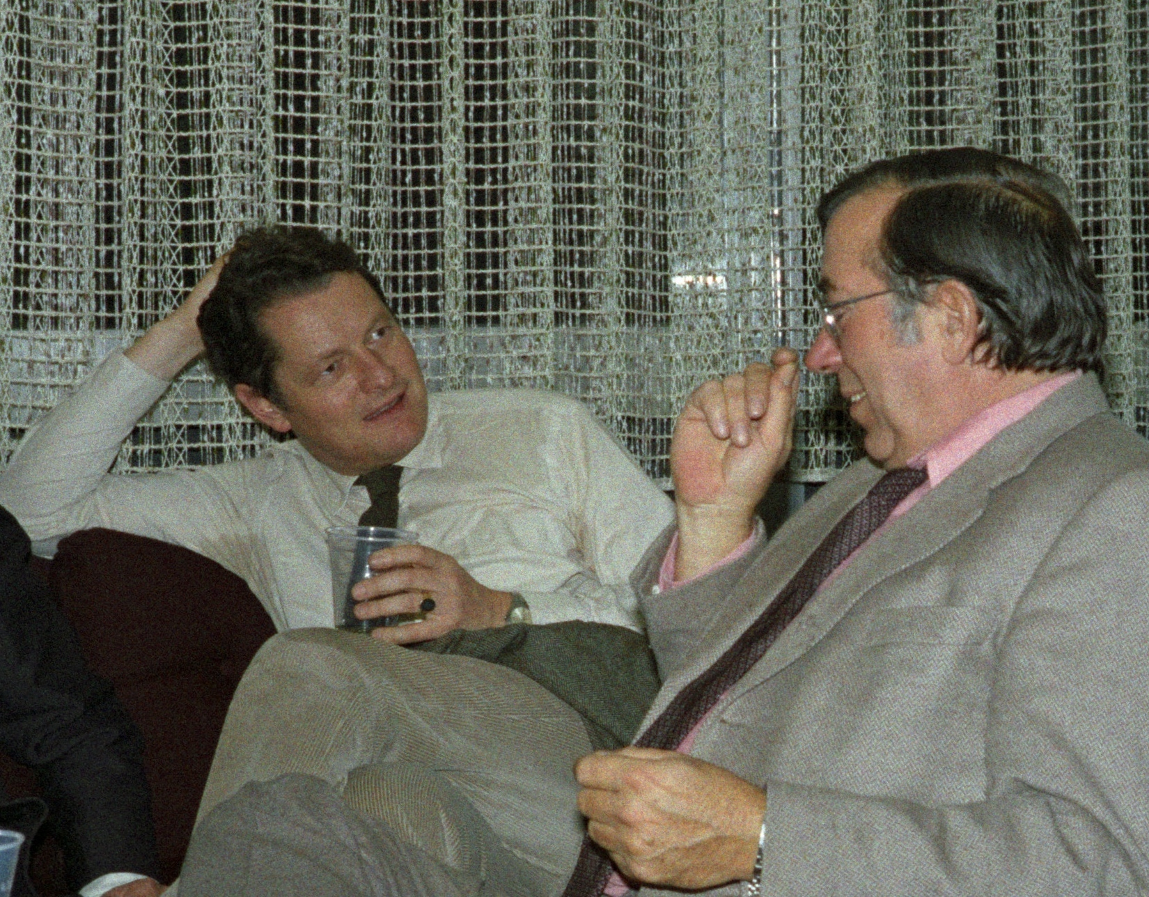 Auslandskorrespondenten Rolf Seelmann-Eggebert (links) und Günter Müggenburg beim Umtrunk im NDR